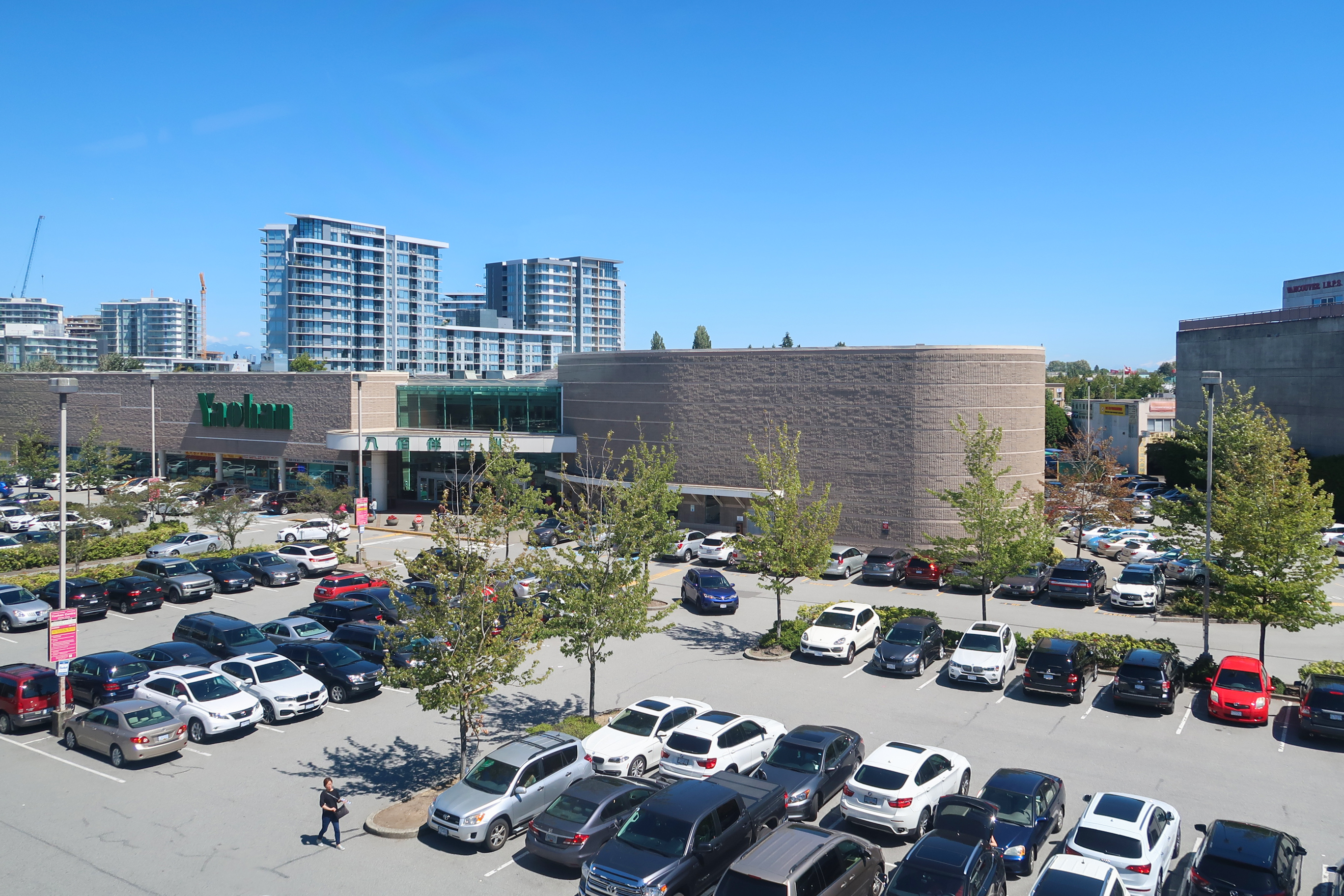 Yaohan Centre